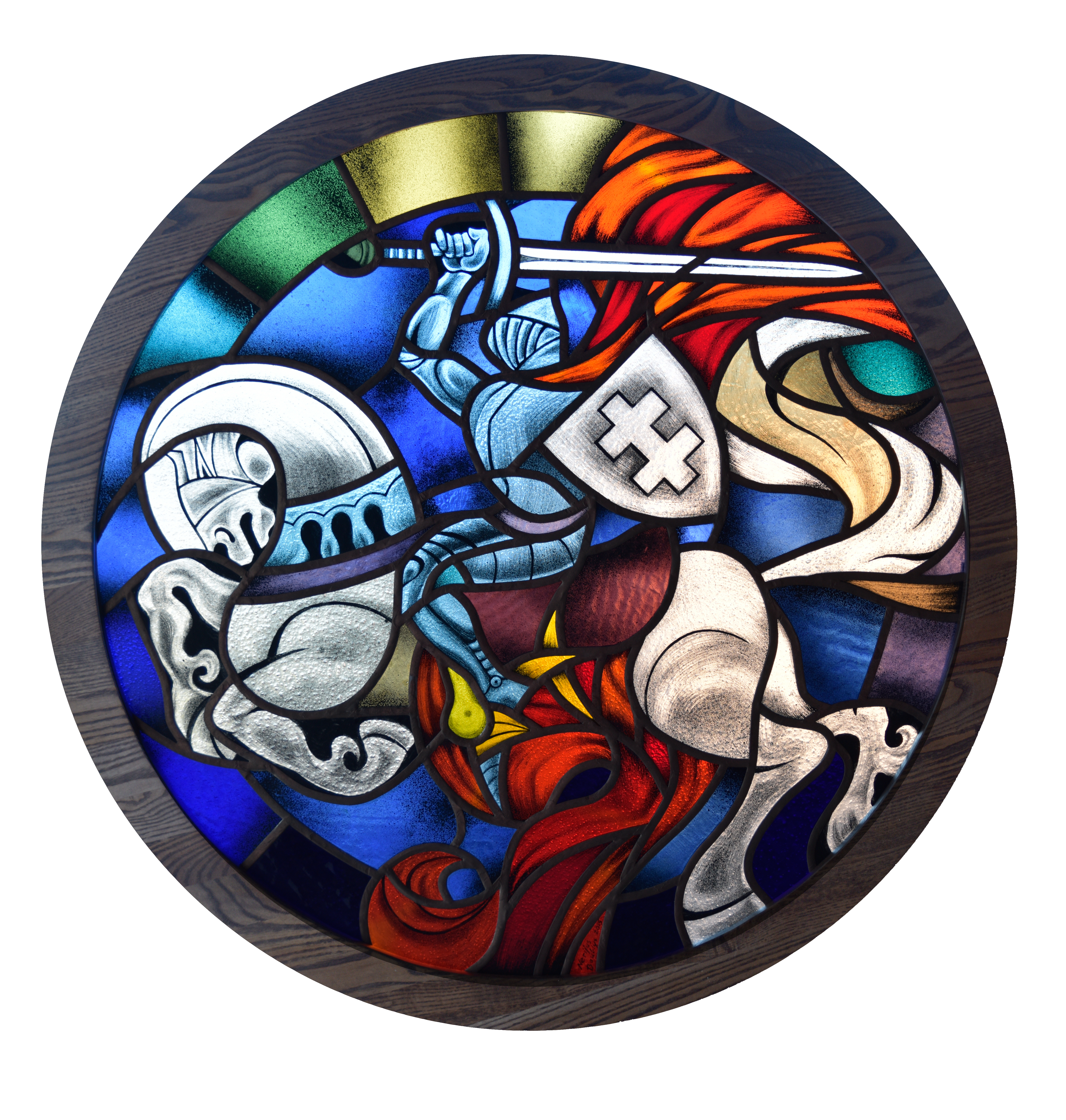 Vitražas Ugninis raitelis Trakų salos pilyje